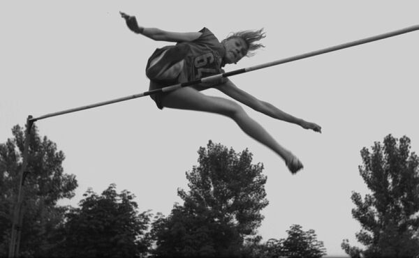 Atleta Iolanda Balaș-Soter, 21 mai 1961